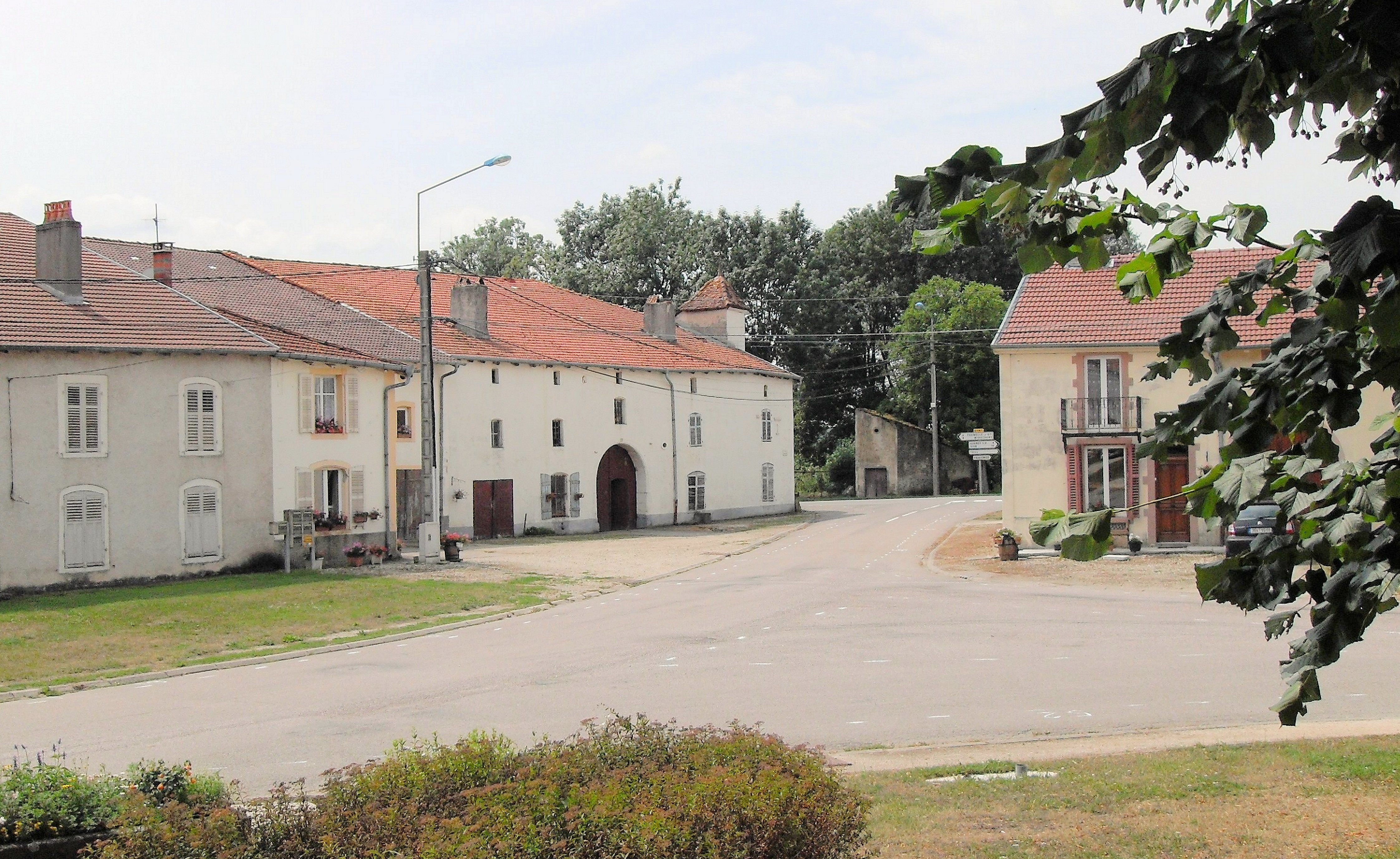 La place Jeanne d'Arc à Boulaincourt